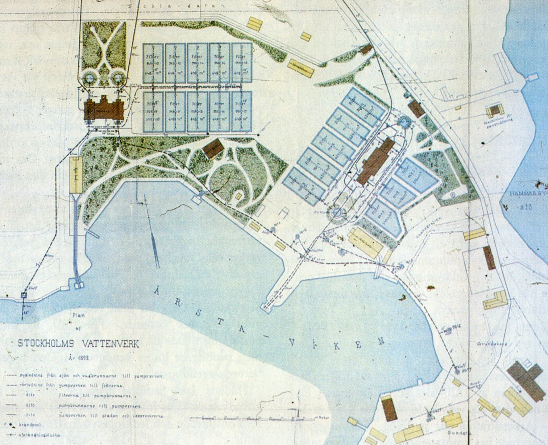 Plan på Skanstullsverken, södra Stockholm